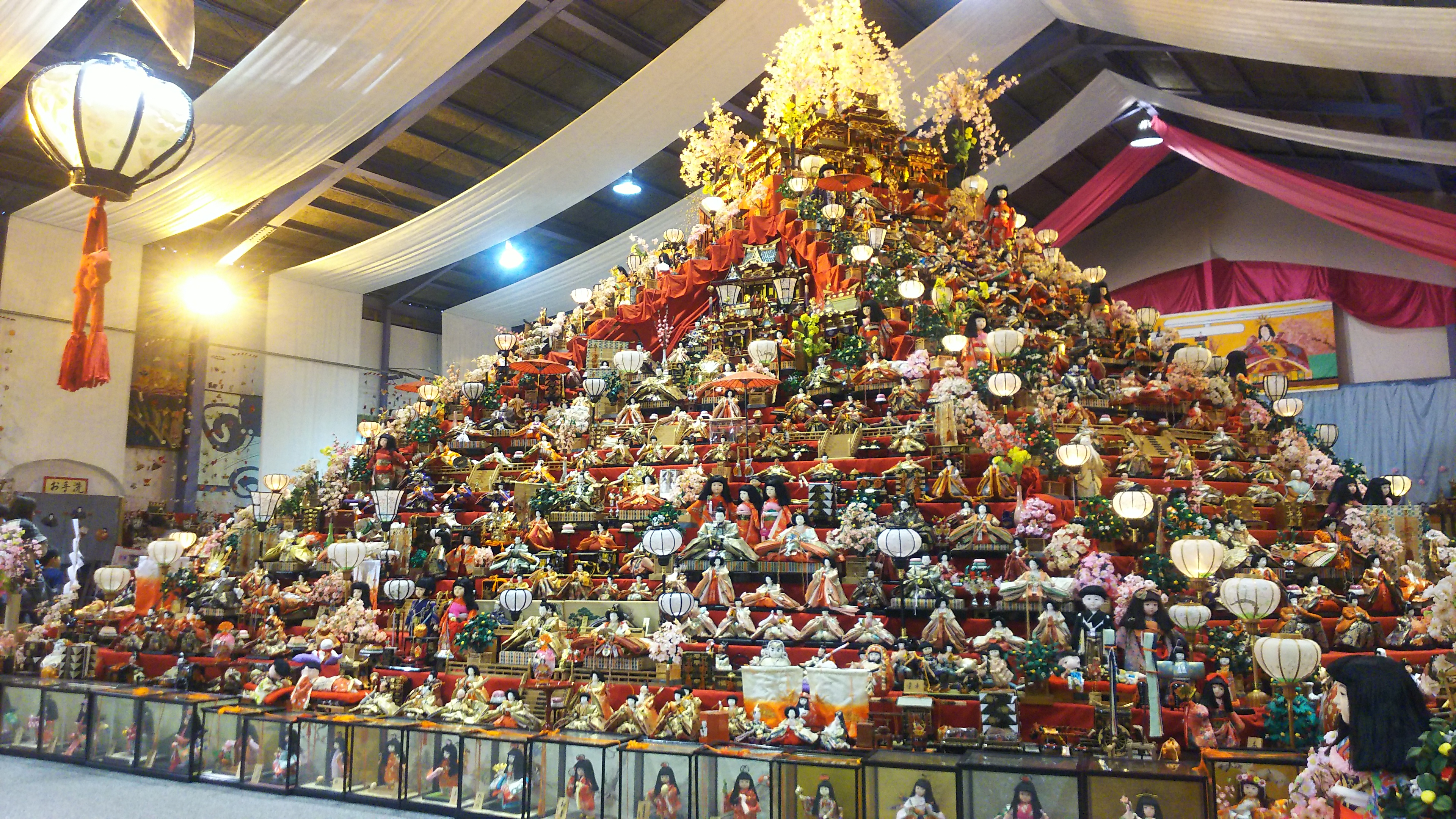 ビッグひな祭り 会場内の様子 2019年03月03日撮影 巨大ひな壇の全景